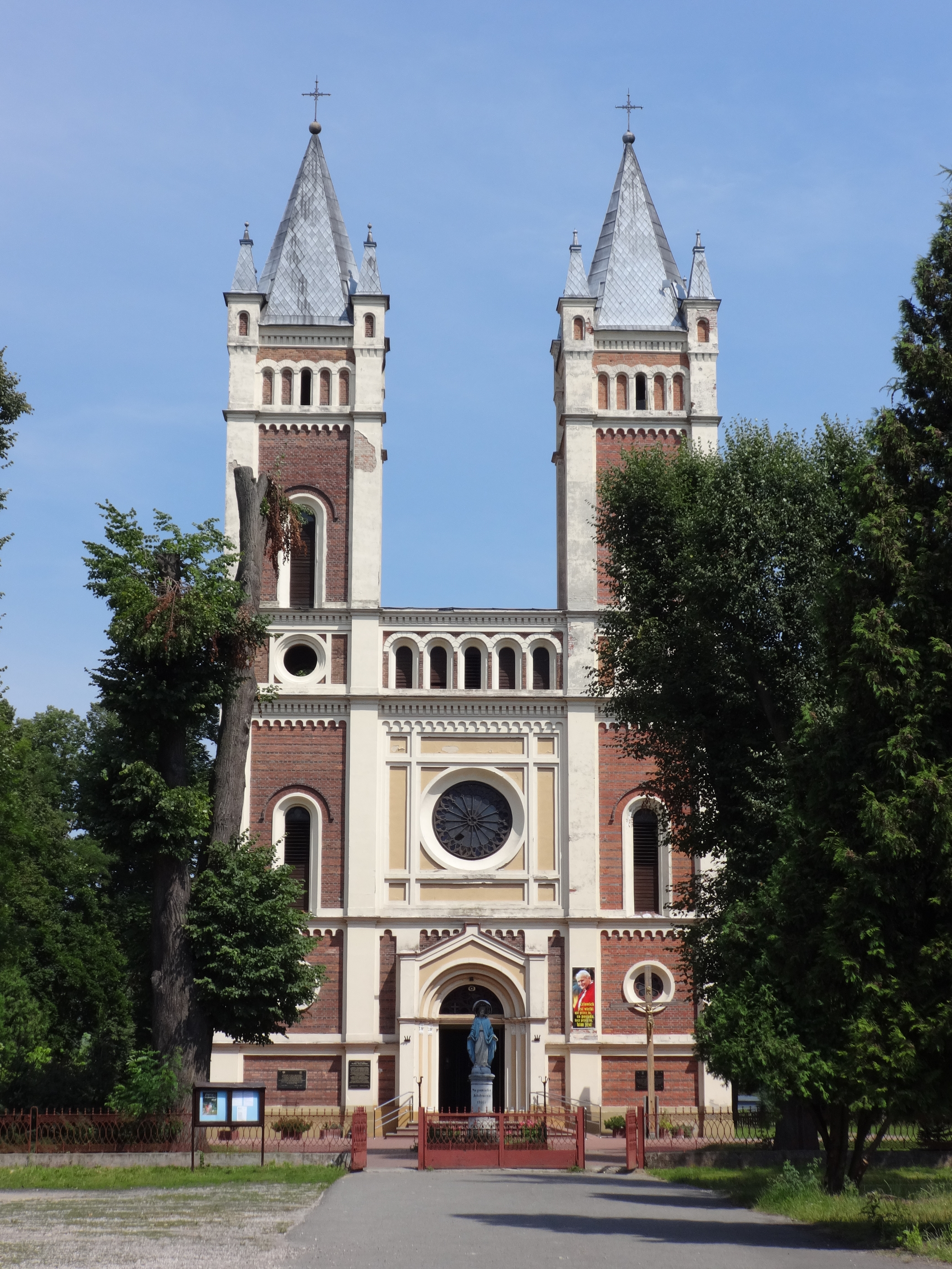 Żytno, kościół par. pw. Niepokalanego Poczecia NMP, 1860-1865